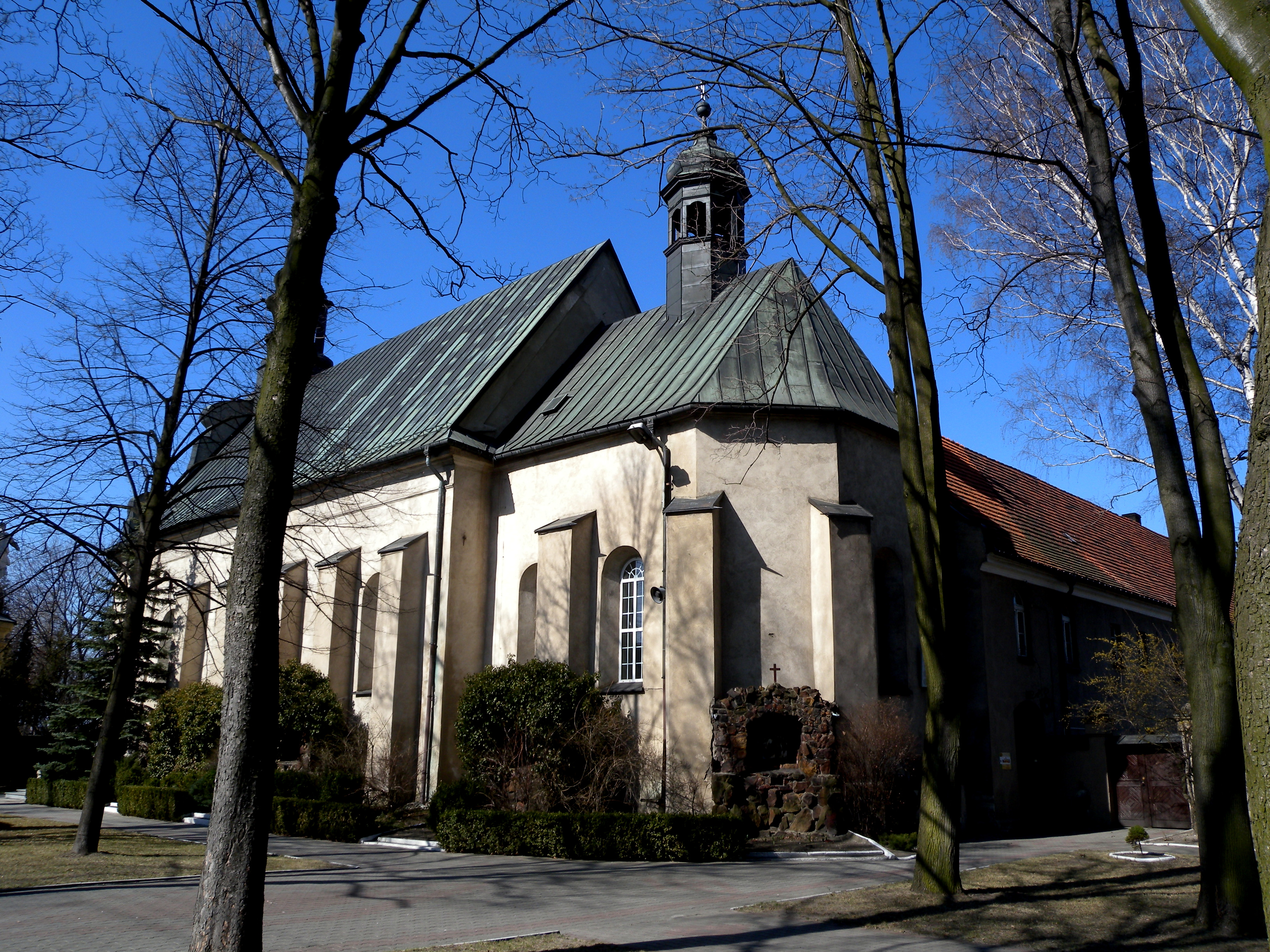 Wieluń ul. Reformatorska 1 - kościół p.w. Zwiastowania NMP, w zespole klasztornym reformatów, mur., 1629, XVIII